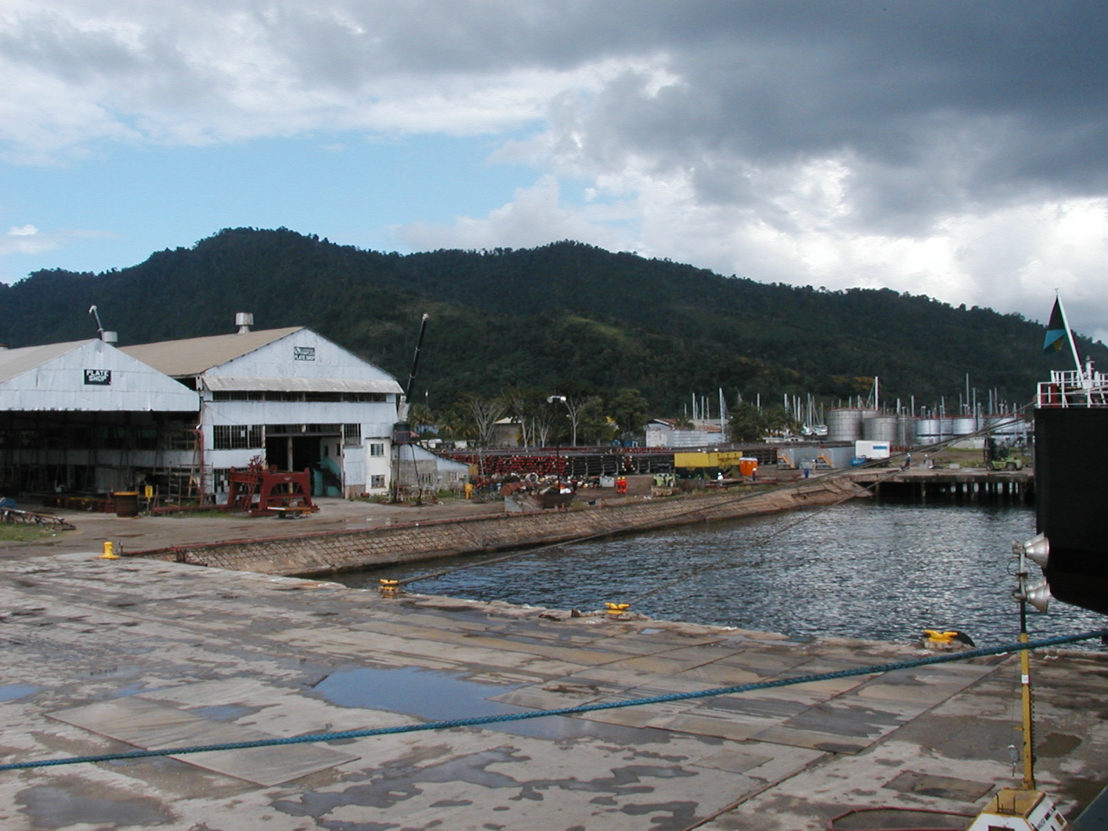 Chaguramas, Trinidad and Tobago